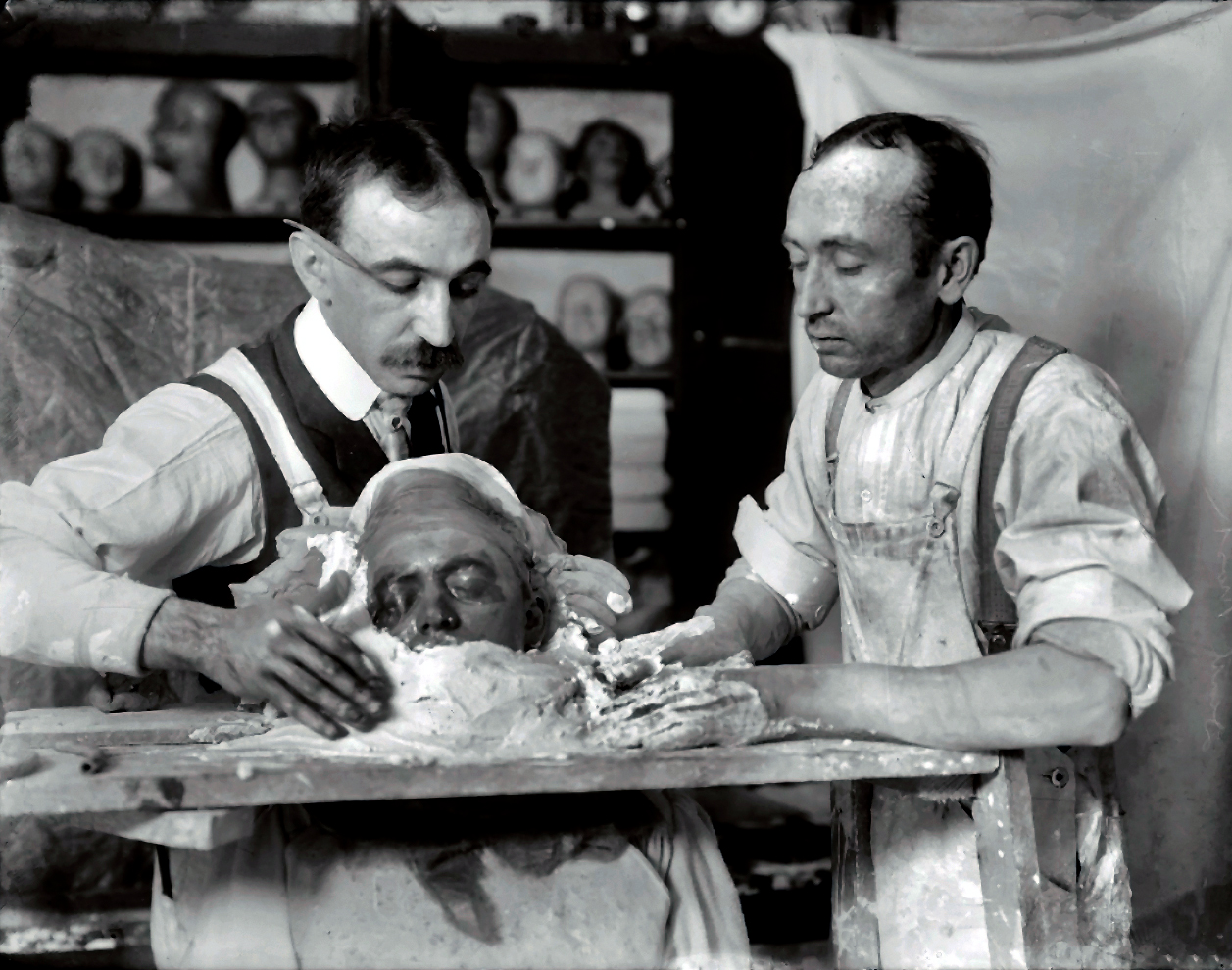 Two men making a death mask